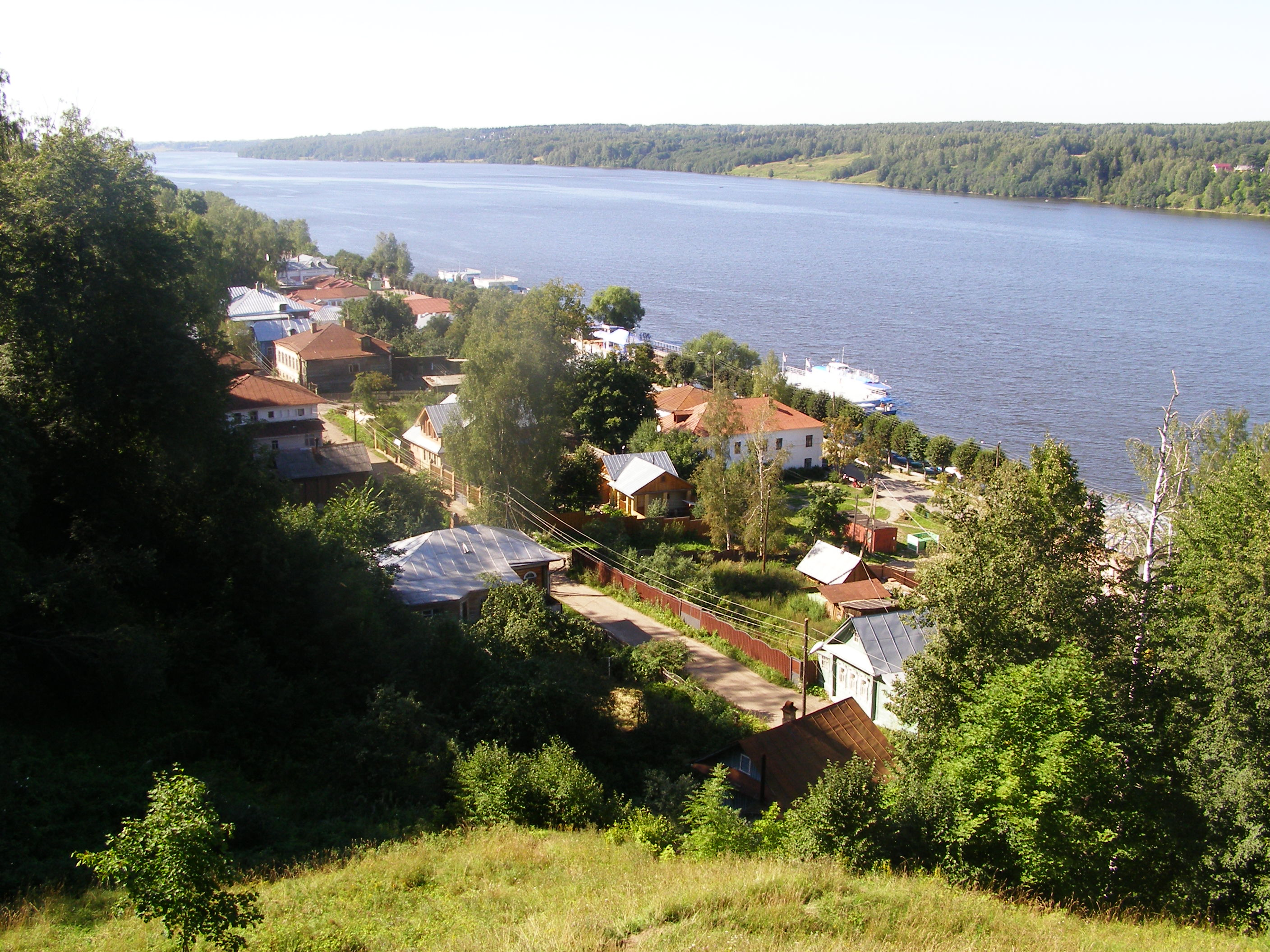 Панорама Плёса с холма